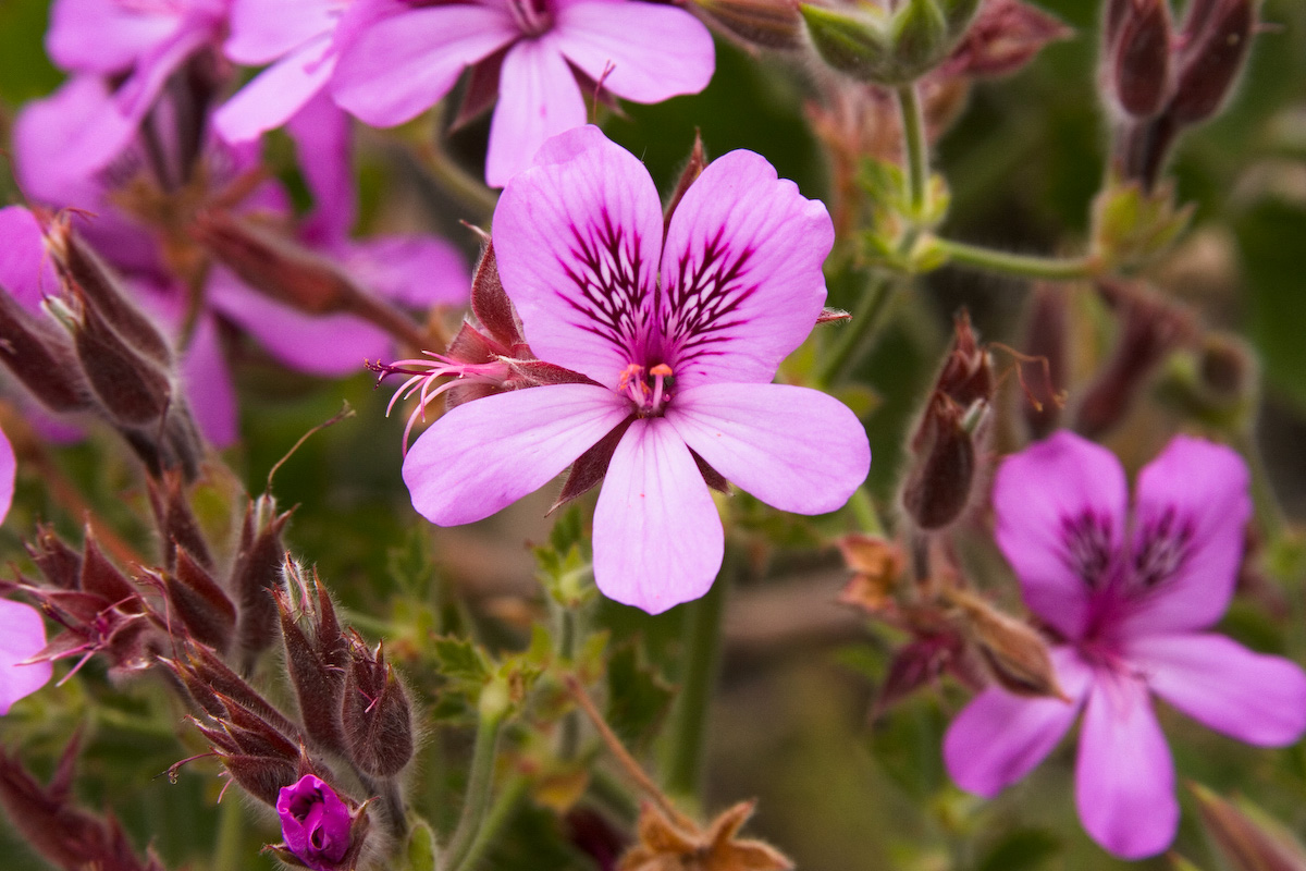 Pelargonium cucculatum